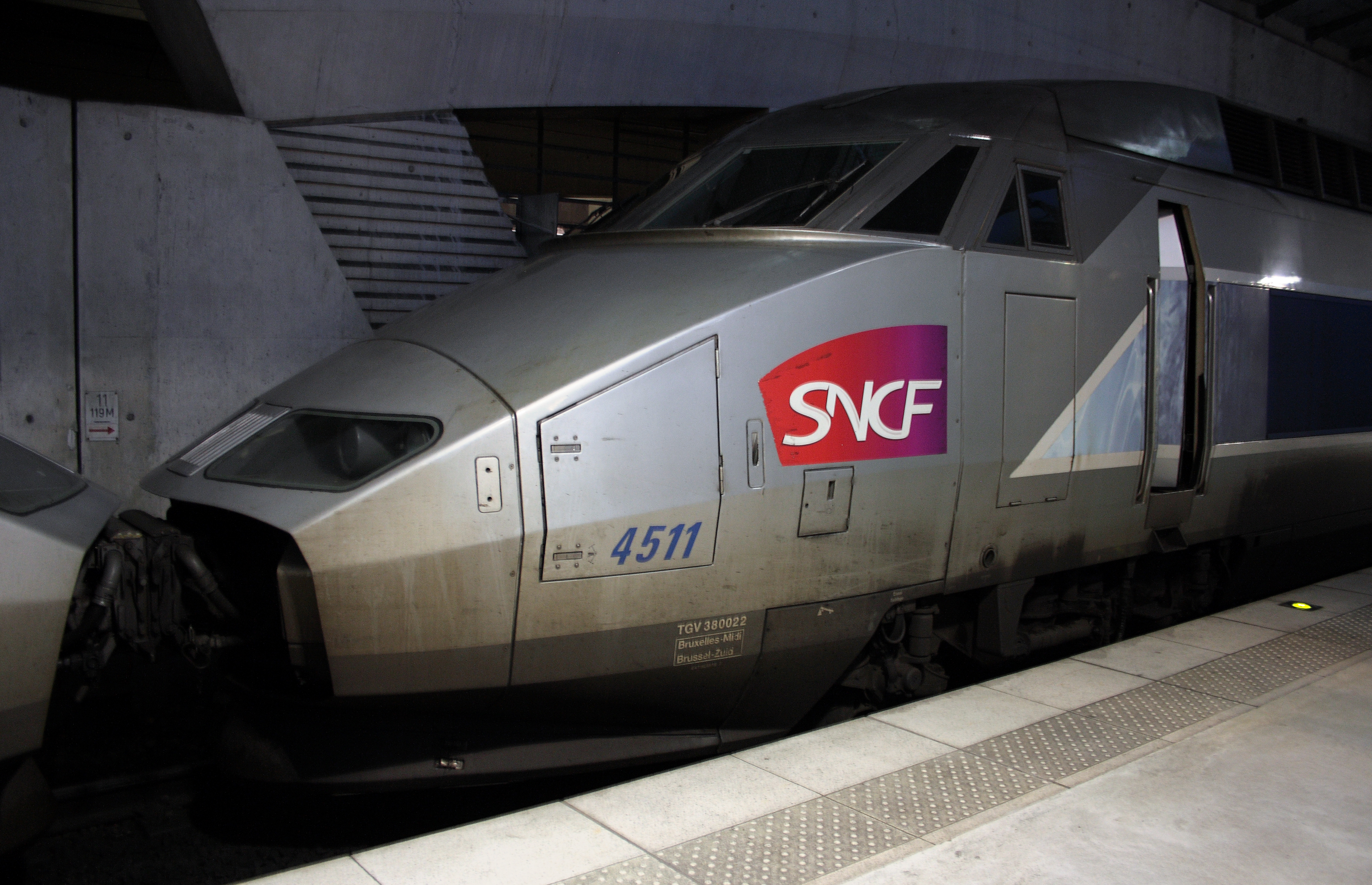 Motrice 380022, stationnée (en unité multiple avec une autre rame) sur la voie 43.